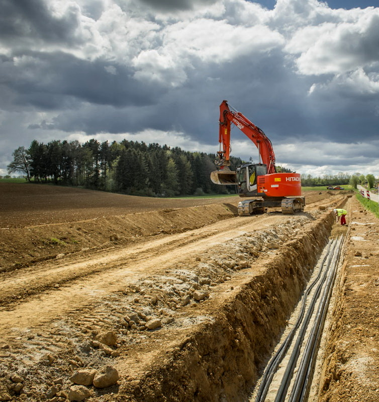 ENRW Energieversorgung Rottweil, Erdverlegung von 110-kV-Hochspannungskabeln – Bau der unterirdischen 110.000-Volt-Leitung zwischen Zimmern und Rottweil